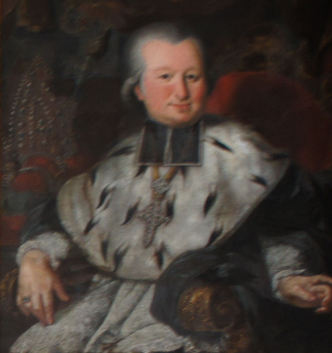 Porträtgemälde von Joseph Konrad Freiherr von Schroffenberg, Fürstbischof von Freising, im Fürstengang zwischen Fürstbischöflicher Residenz und Freisinger Dom.